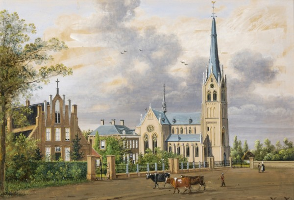 Schilderij van de kerk van Dinther